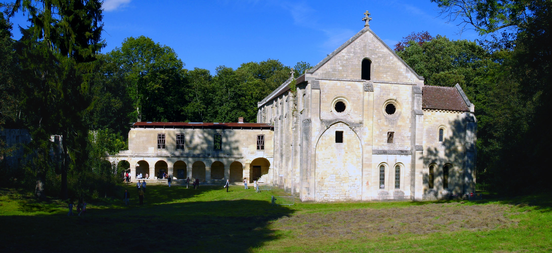 Abbaye Notre-Dame du Val, Mériel (Val-d'Oise), France.